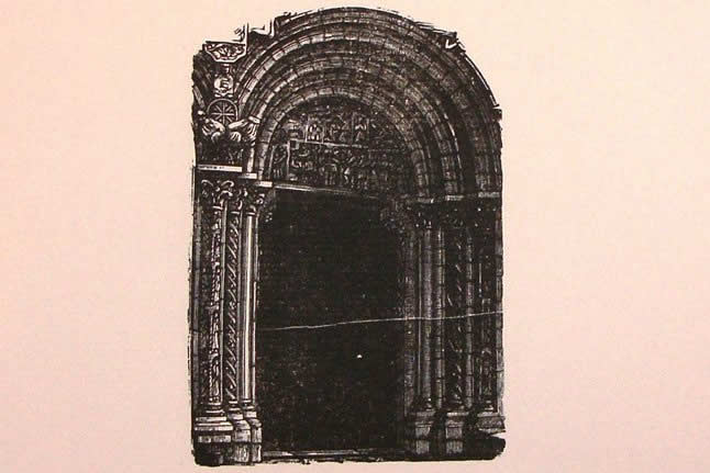 Xilografía de Enrique Mayer de 1889 da Portada de Praterías da Catedral de Santiago de Compostela. Enrique Mayer foi un gravador e acibecheiro compostelán nado en 1861 e finado en 1931.